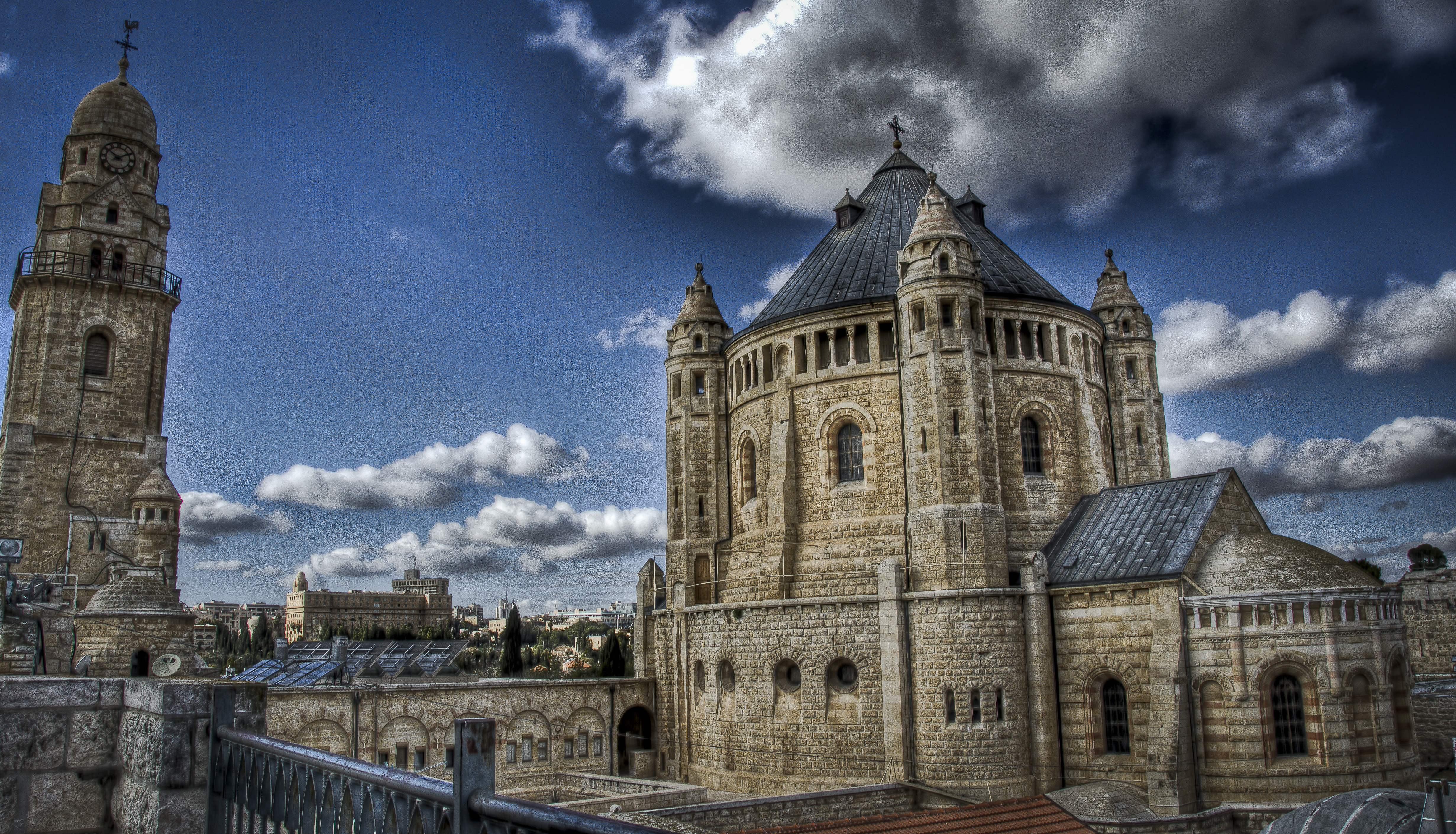 כנסיית דורמיציון היא כנסייה של המסדר הבנדיקטיני על הר ציון בירושלים, בקרבת שער ציון, קבר דוד ובסמוך לחומה הדרומית של העיר העתיקה. לפי אחת המסורות, היא ניצבת במקום בו נרדמה מרים, אם ישו לשנת הנצח. ב-1998 שונה השם ל'האגיה מריה סיון'.